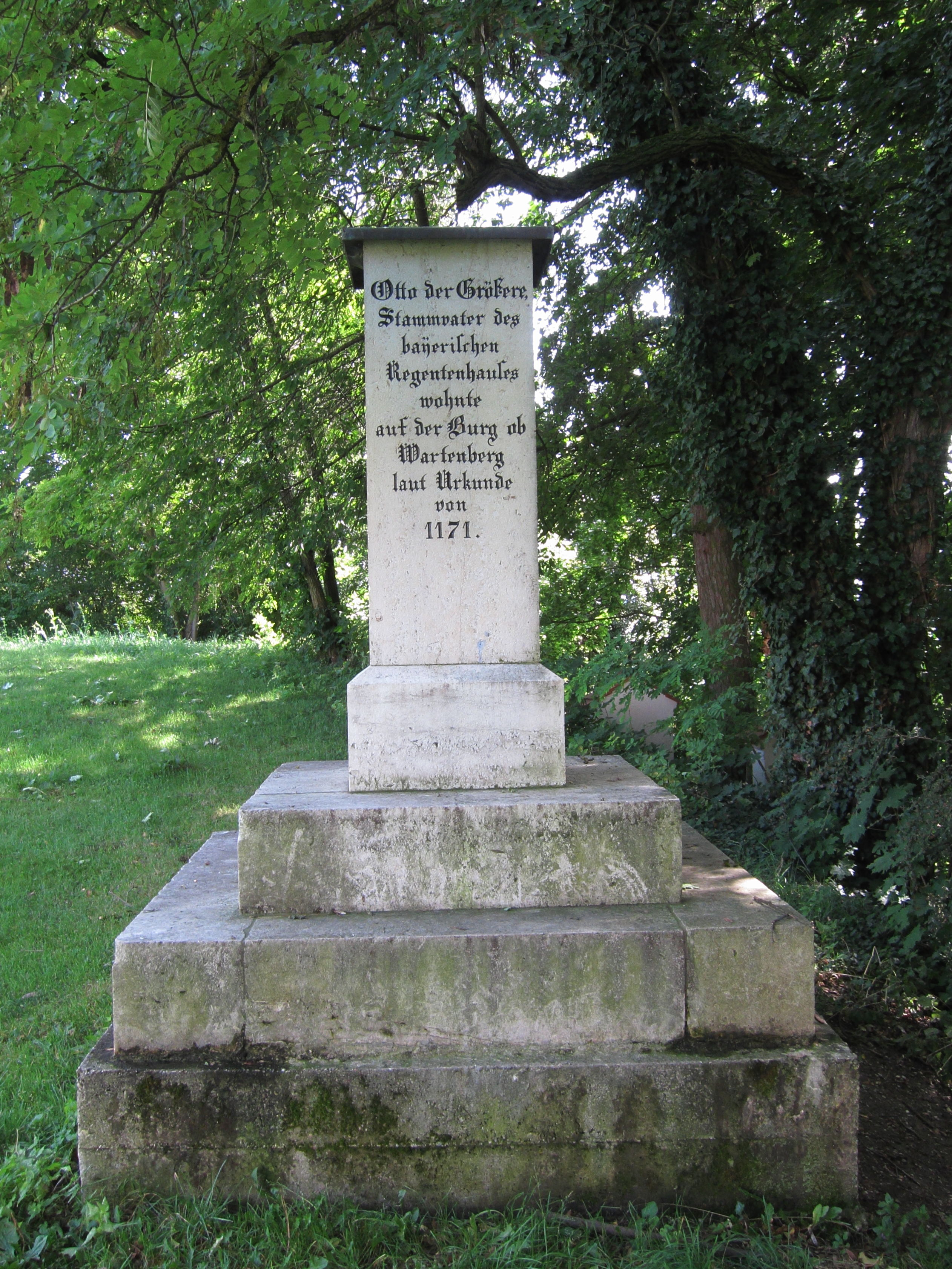 Wartenberg; Gedenkstele an die abgegangene Burg Wartenberg, klassizistische Stele aus Kalkstein auf einem dreistufigen Postament, 1855.